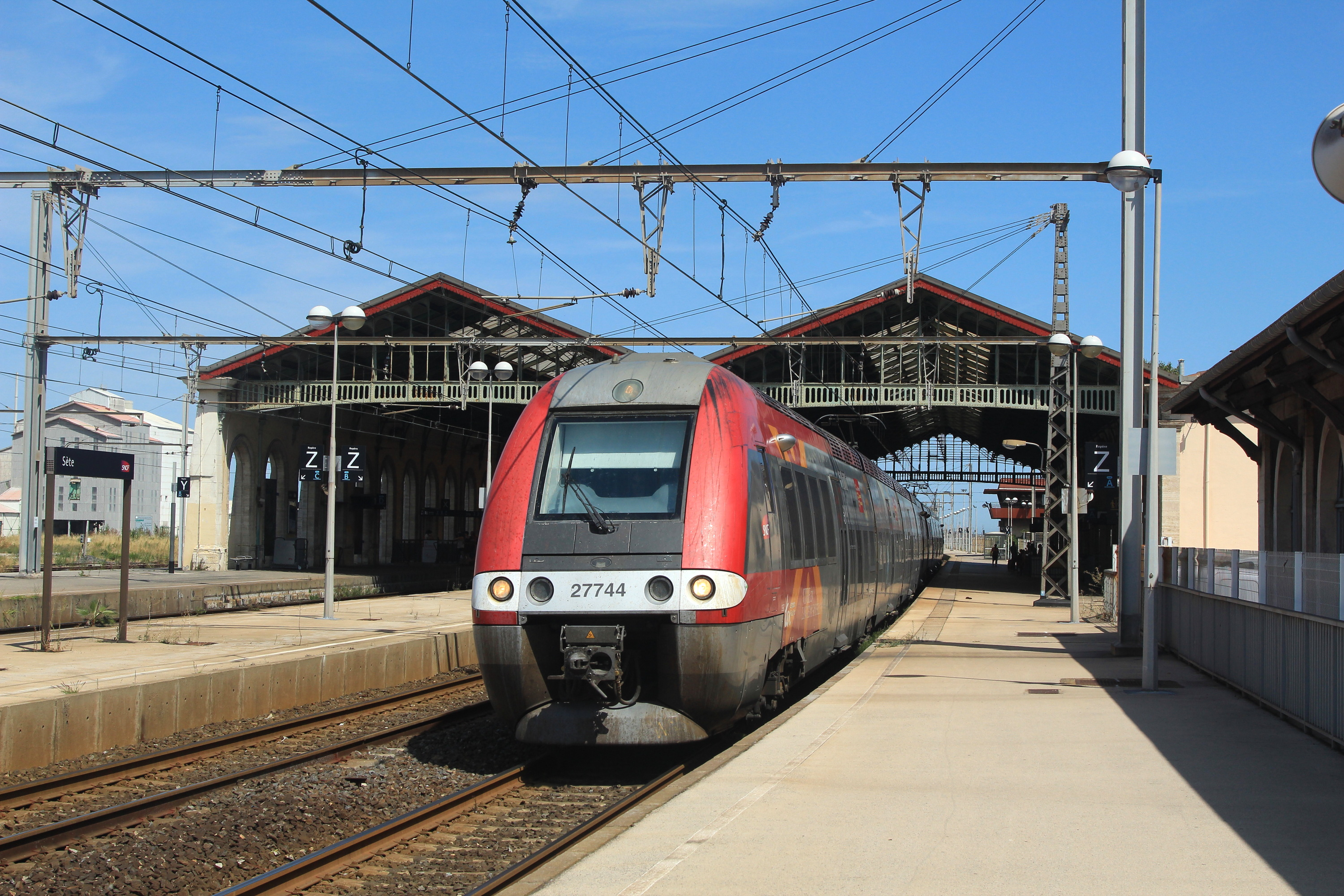 une UM de ZGC, dont la Z 27744/3 en tête, repartent après avoir desservit la gare de Sète.